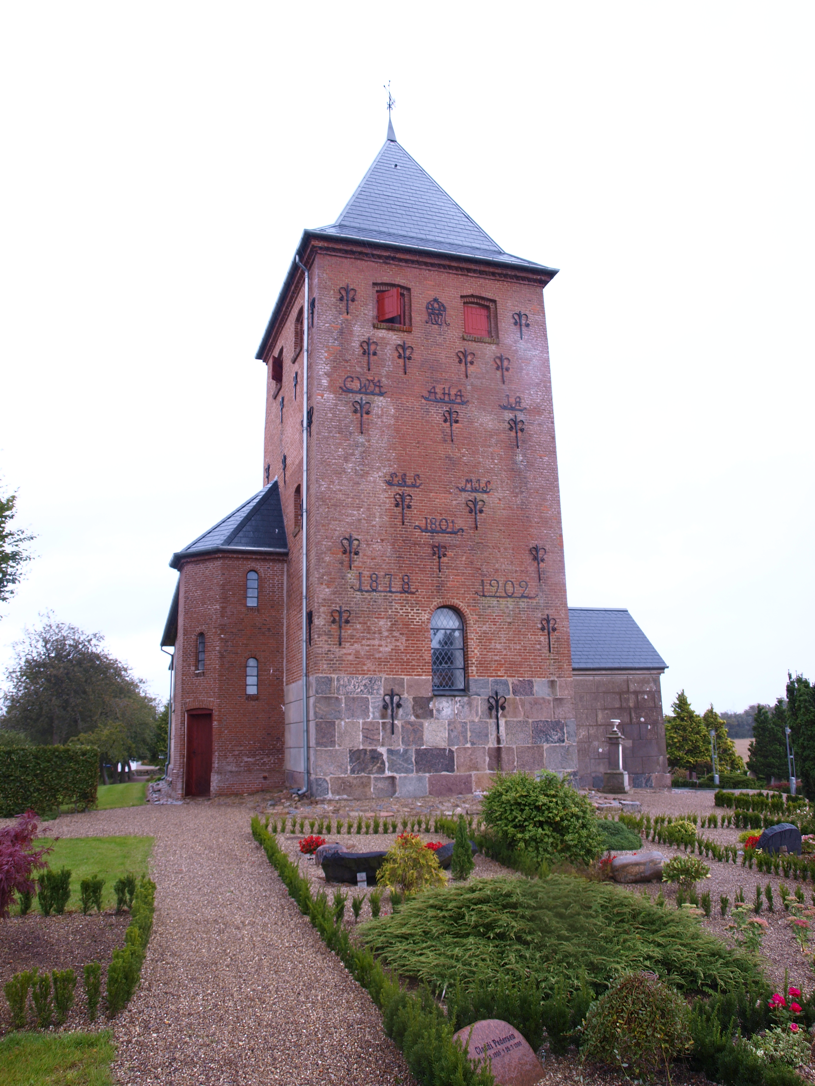 Taps Kirke, kirketårn, 5 september 2015